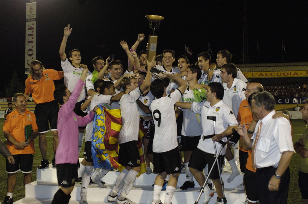 Guanyador Cotif 09 (València CF)